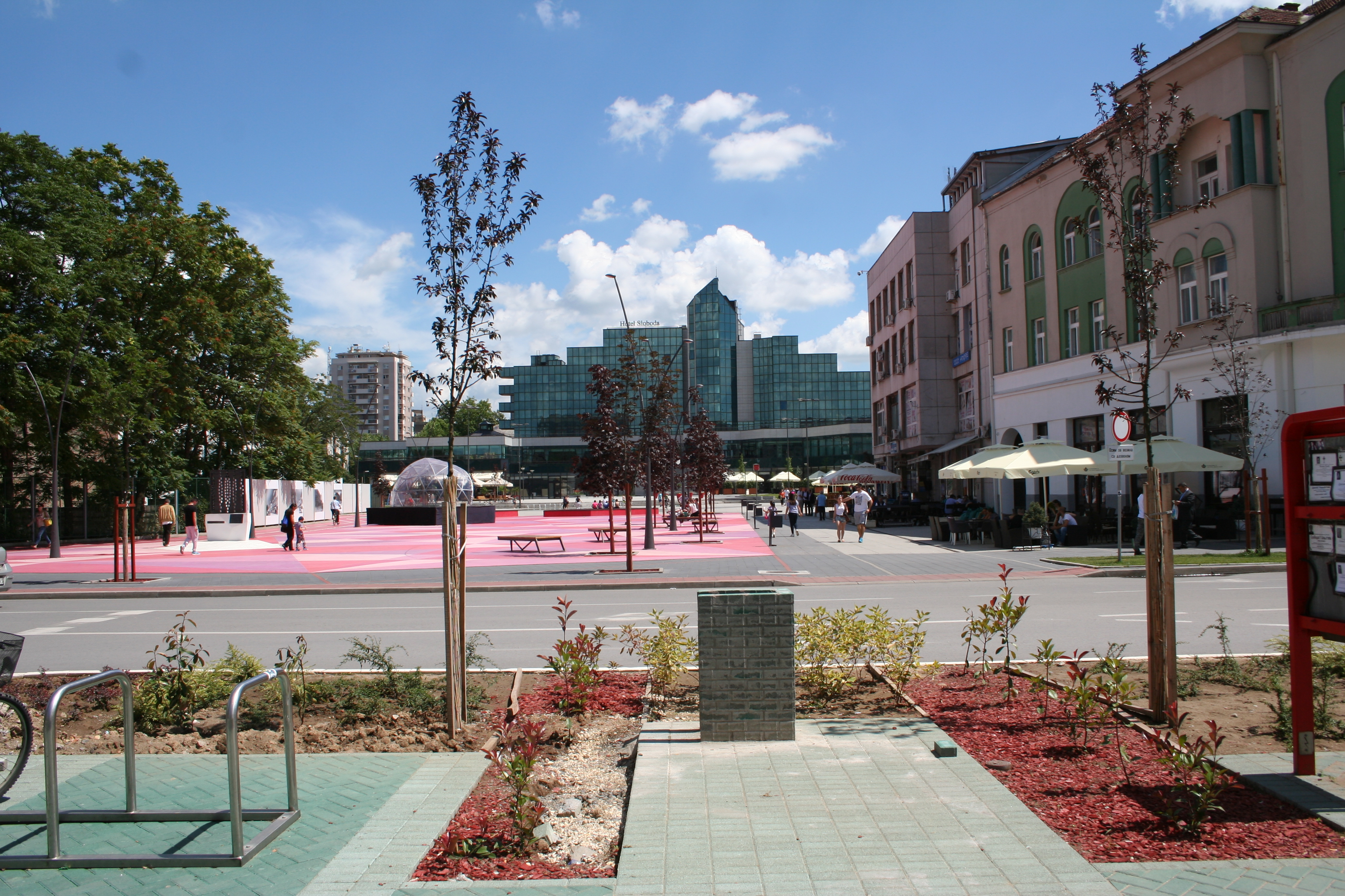 Trg šabačkih žrtava